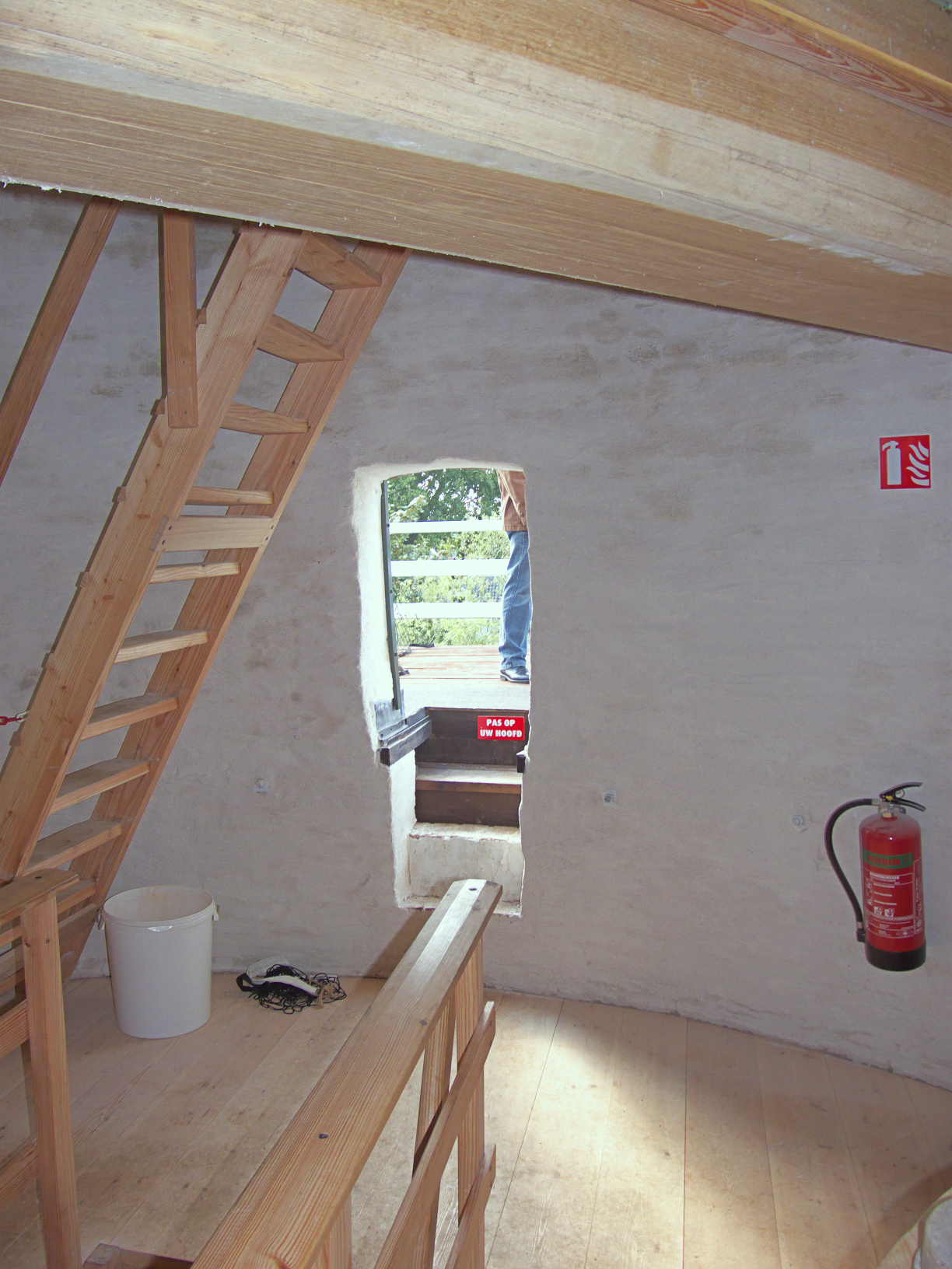 Renkumse molen, stellingdeur